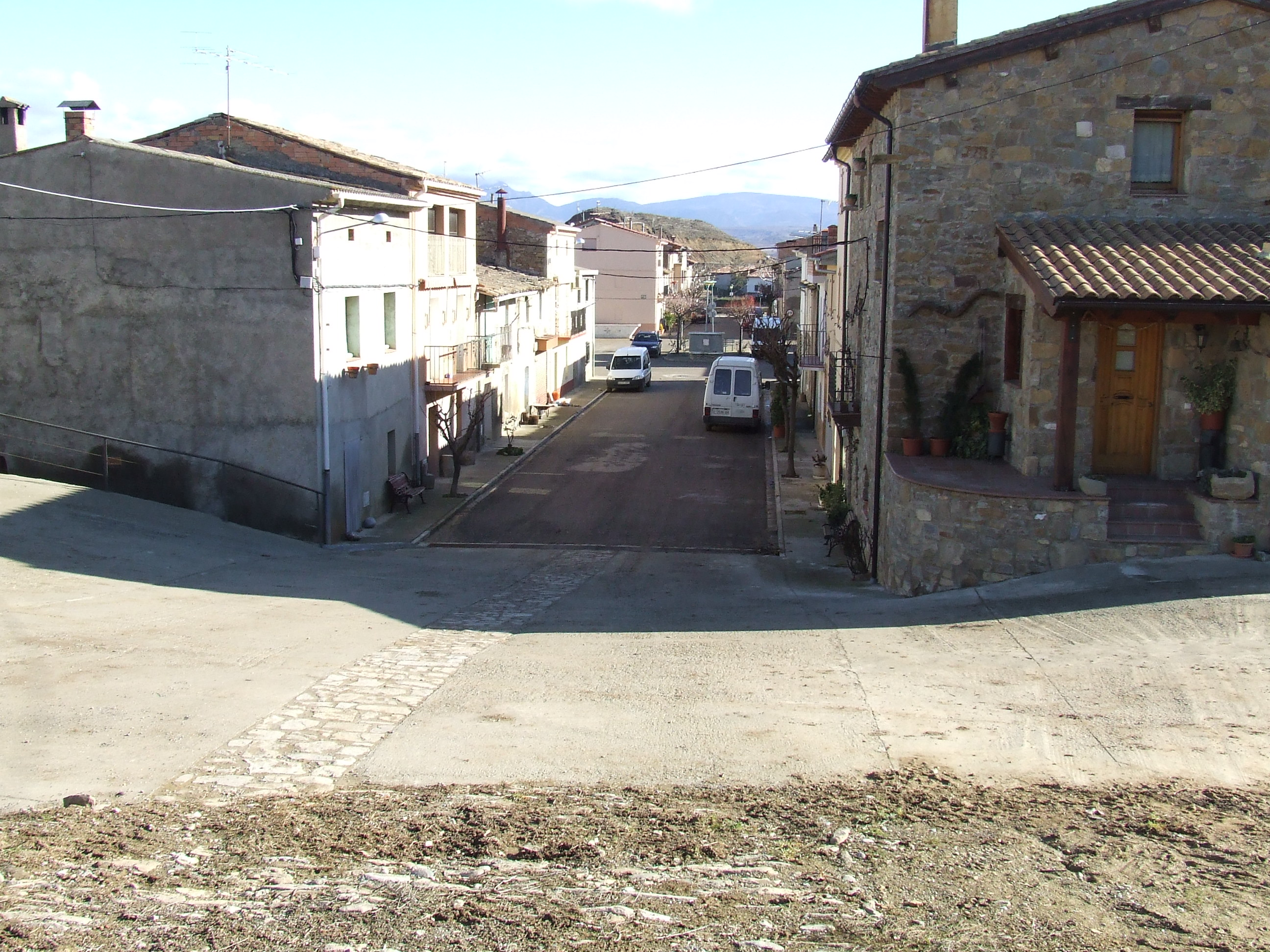 Carrer únic de Puigcercós (Palau de Noguera, Tremp, Pallars Jussà)